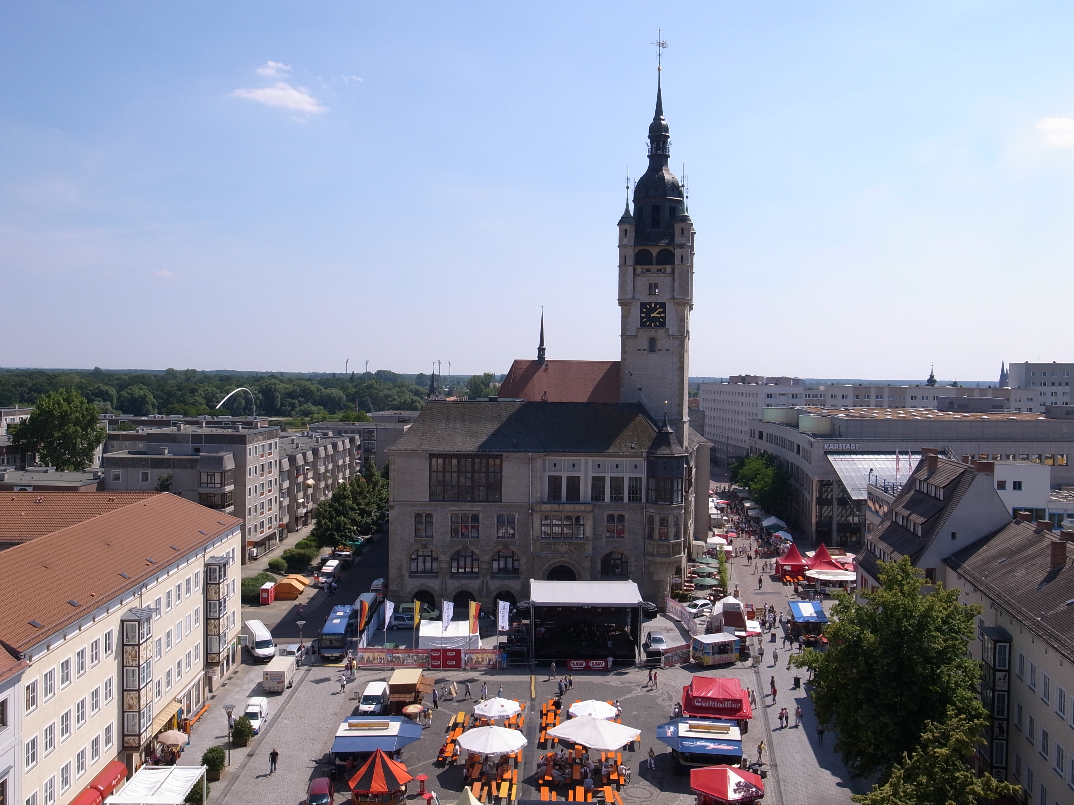 Rathaus Dessau, Leopoldsfest 2010, Aussicht vom Riesenrad